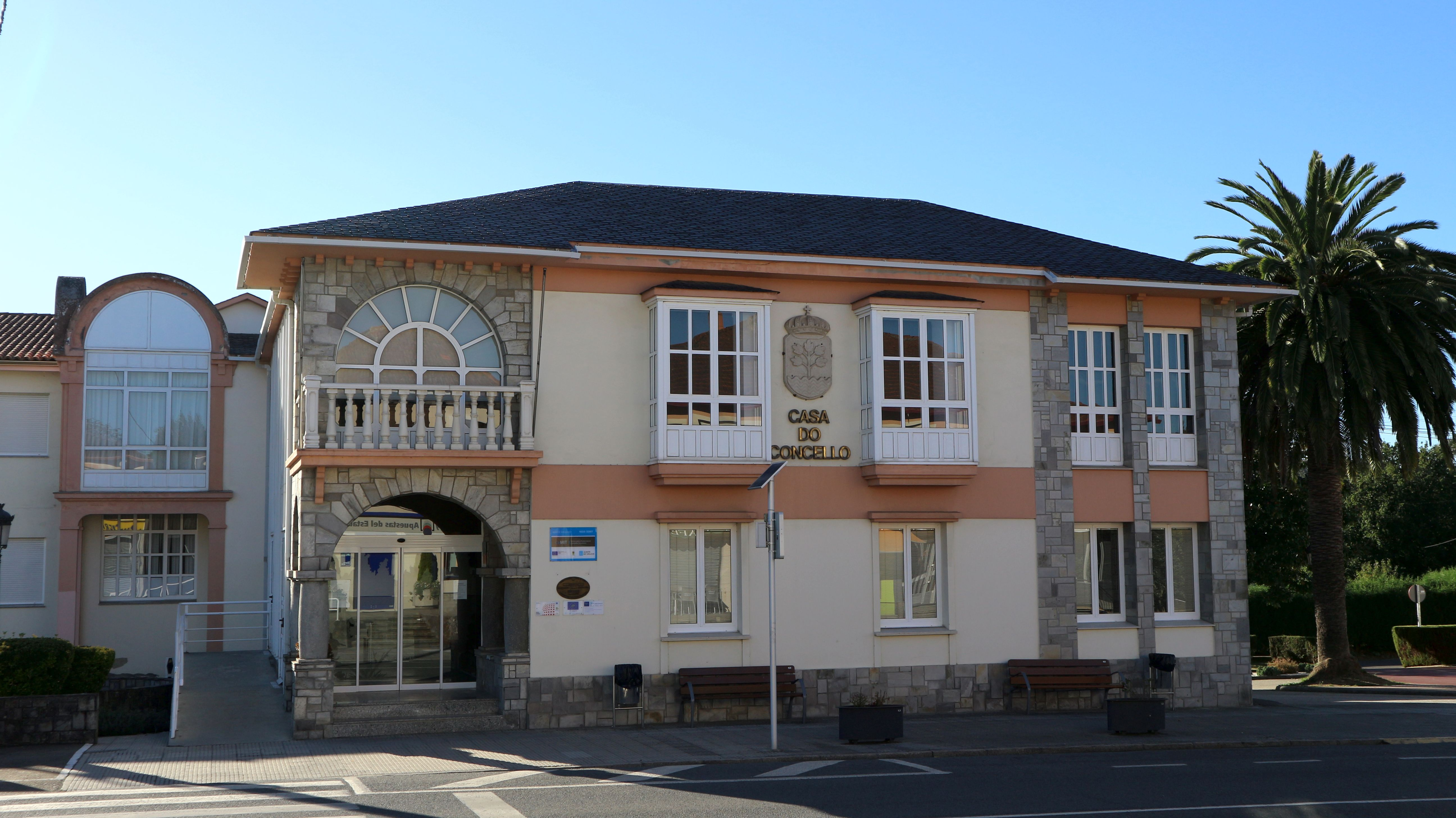 Casa consistorial do Concello de Abegondo. San Marco, Abegondo, Abegondo.